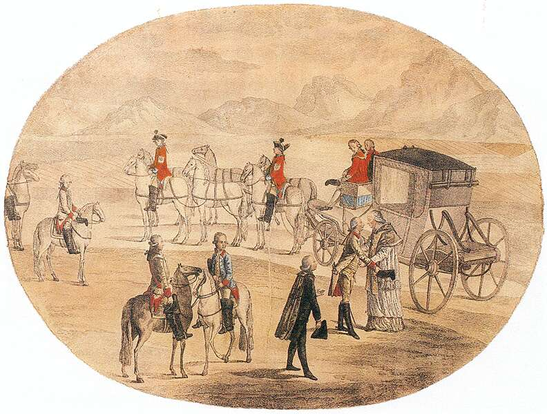 Hieronymus Löschenkohl (1753–1807): Kaiser Joseph II. begrüsst Papst Pius VI. zwischen Neunkirchen und Stuppach, 22. März 1782.